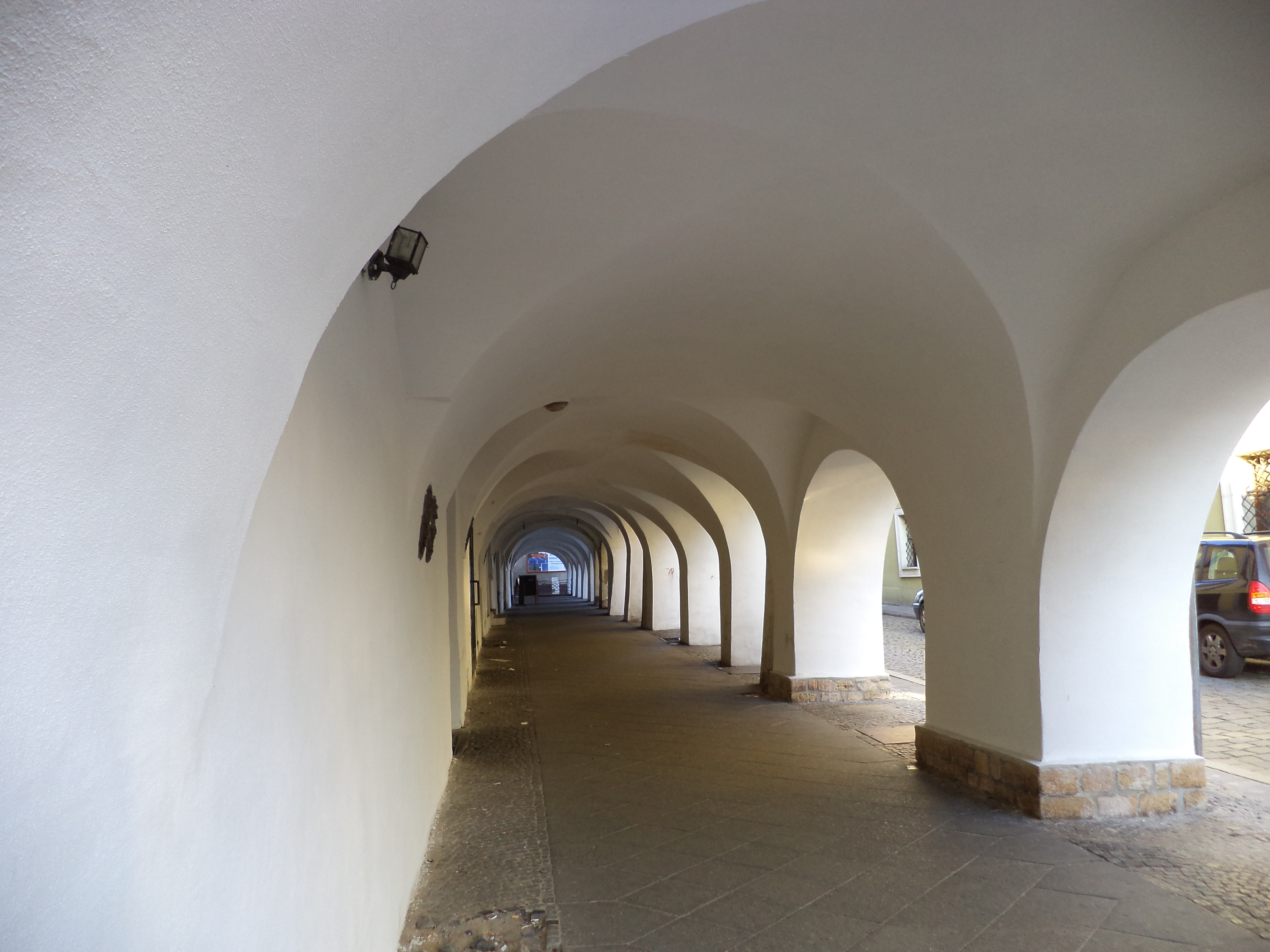 Tarnowskie Góry, podcienia. Widok w kierunku północnym